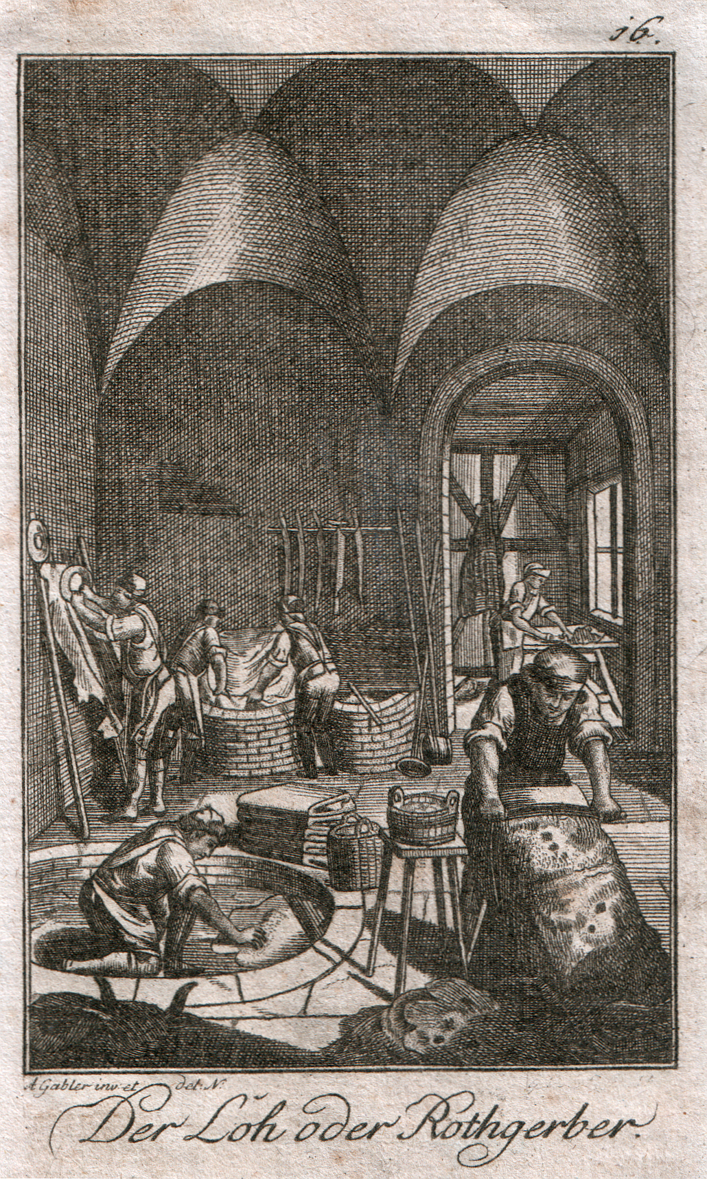 Der Loh oder Rothgerber. A. Gabler inv: et det: N: Vermerk des Antiquars: J. P. Voit 1790